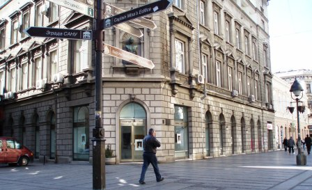 Фотографија Галерије УЛУС-а у Београду Ул. Кнез Михајлова, Аутор: Nicolo